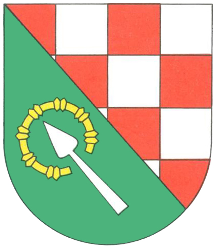 Wappen von Rimsberg